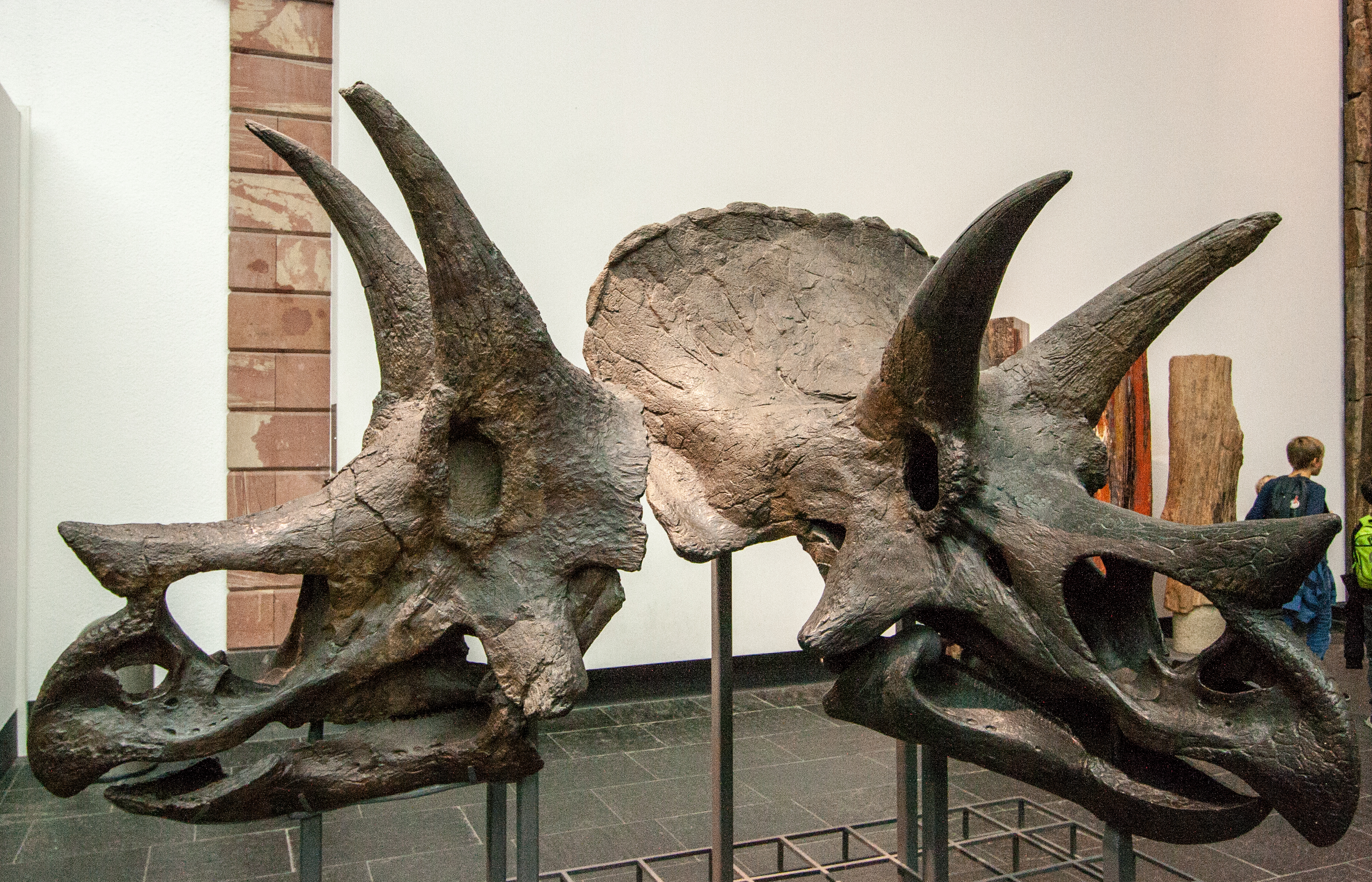 Triceratops